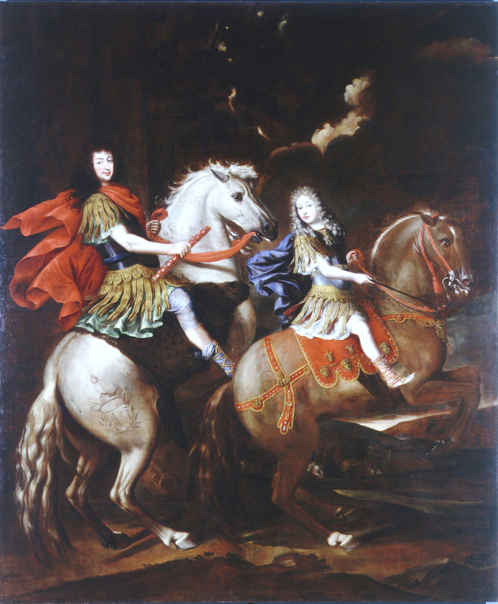 Caption from the museum's website L'età apparente di Vittorio Amedeo giovinetto (1666-1732) e la presenza del duca Carlo Emanuele (1634-1675) lasciano supporre una data non lontana dal 1675 per questo dipinto, che aderisce alla tradizione retorica di corte che identifica nel ritratto equestre la forma più alta di rappresentazione della regalità e ha come immediati precedenti il ciclo eroico-venatorio realizzato da Dauphin per la Reggia di Diana alla Venaria Reale. Il dipinto è un pendant del ritratto equestre di Maria Giovanna Battista di Savoia-Nemours (rispettivamente moglie e madre dei due cavalieri ritratti da Brambilla) attribuito al pittore torinese Giovanni Luigi Buffi (767/D). L'esecuzione dell'opera si può attribuire a Giovanni Battista Brambilla, allievo di Dauphin, che aveva fornito i disegni dei dieci ritratti della Venaria incisi da Tasnière e destinati a illustrare il libro di Amedeo di Castellamonte sulla Reggia. Il dipinto si differenzia dalle opere del maestro per una maggiore rigidità formale. Il costume all'antica del sovrano e la vistosa marchiatura del cavallo ducale in forma di L laureata e coronata richiama il modello del celebre ritratto equestre di Luigi XIV di Francia eseguito da Pierre Mignard, oggi conservato a Versailles. L'acquisto nel 1726 di una replica del ritratto è una prova significativa della fortuna iconografica del dipinto alla corte sabauda.